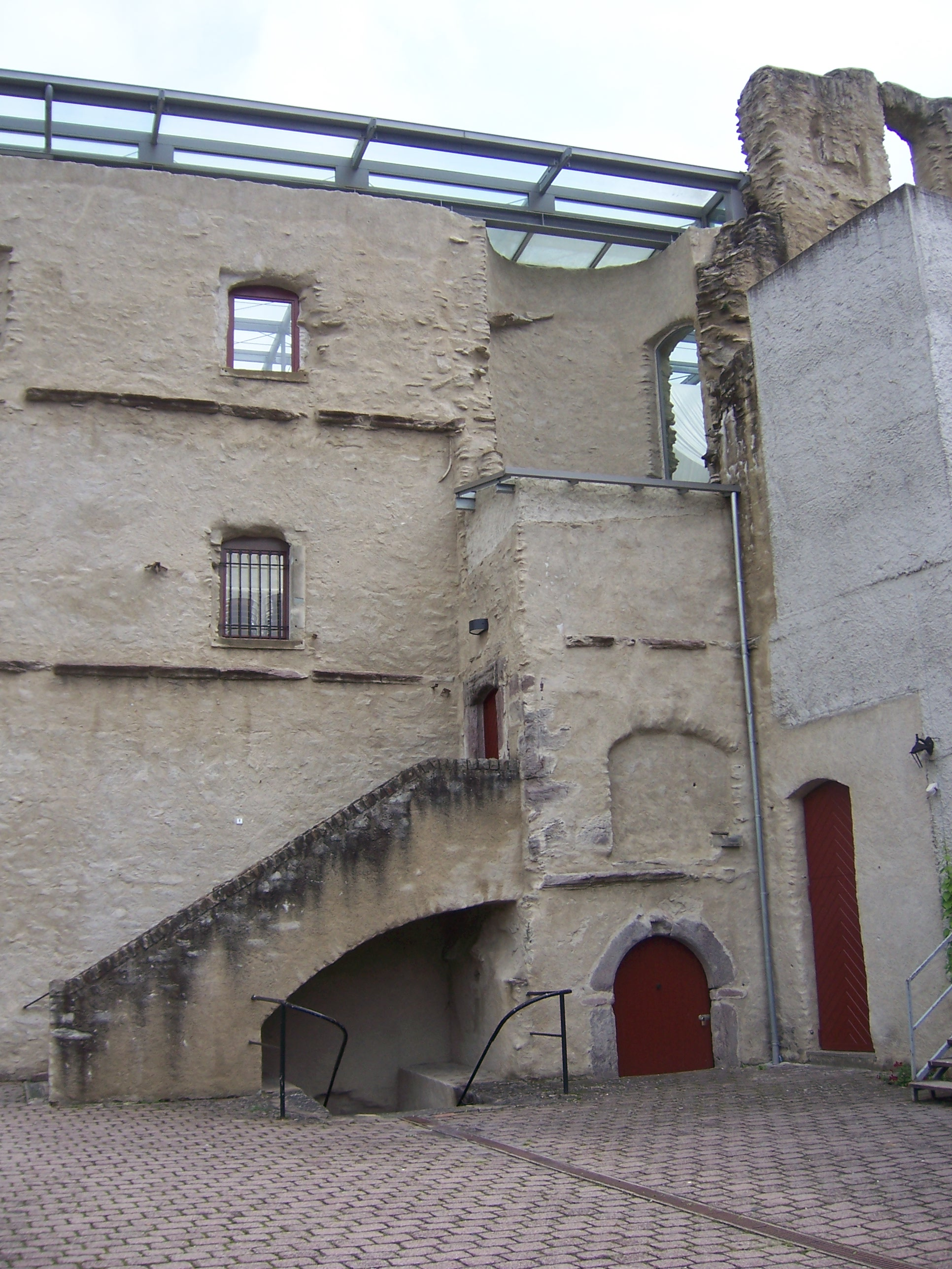 Castle Laneburg in Loehnberg, Germany